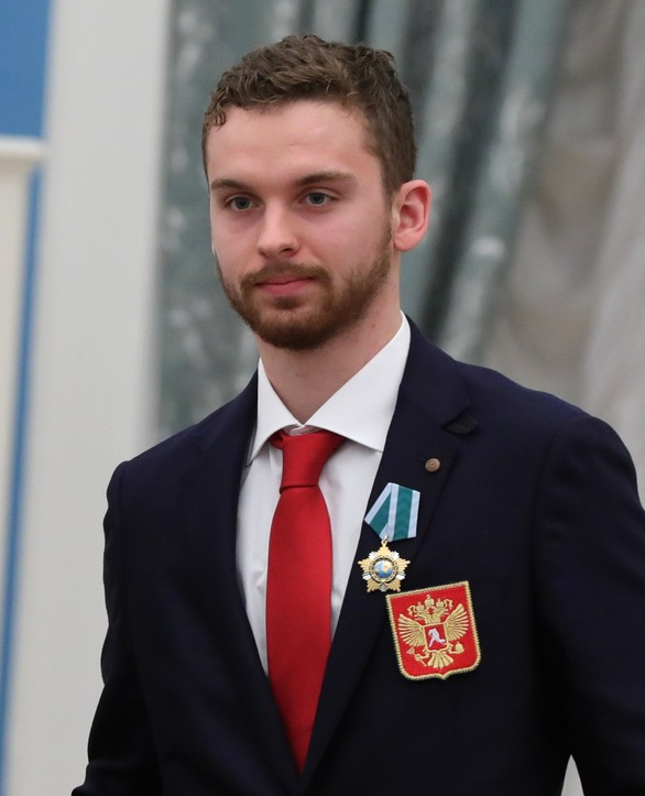 С олимпийским чемпионом по хоккею Ильёй Сорокиным